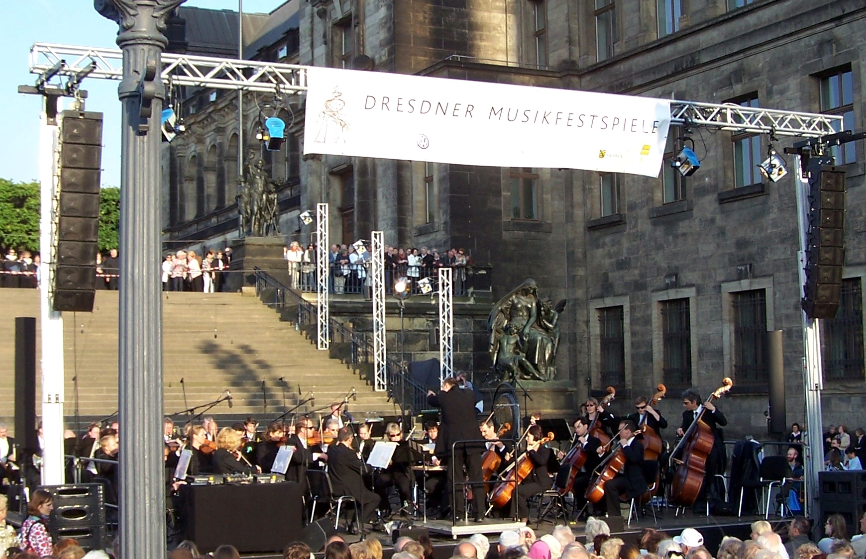 Auftritt Neue Elbland Philharmonie bei Dresden singt und musiziert im Rahmen der Dresdner Musikfestspiele 2010